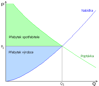 Graf nabídky a poptávky